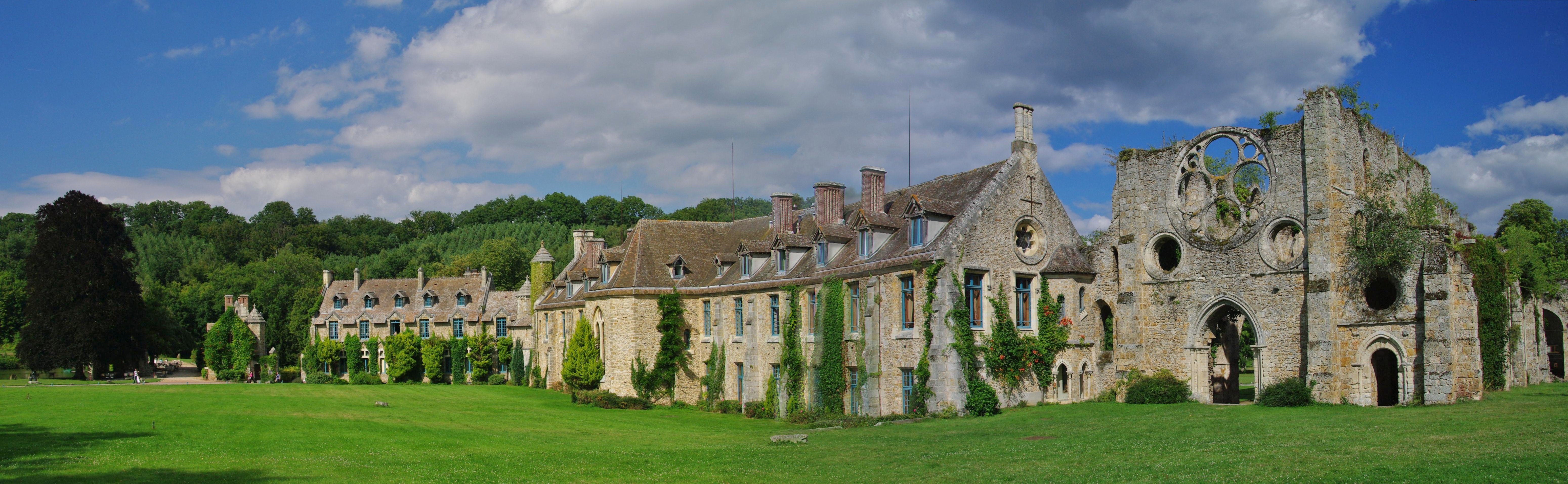 Abbaye des Vaulx de Cernay